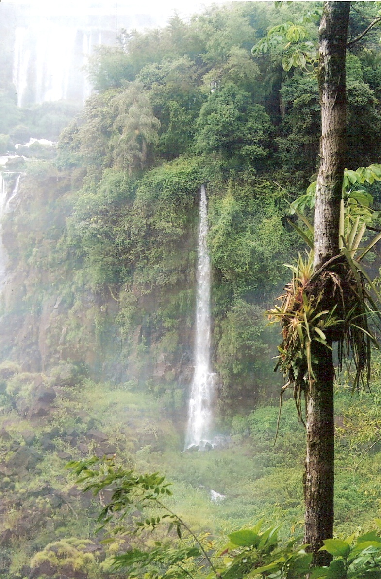 Mały wodospadzik w wielkim kompleksie wodospadów Iguaçu po stronie brazylijskiej.